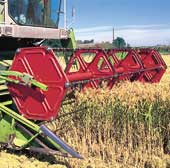 Maschinelle Reisernte